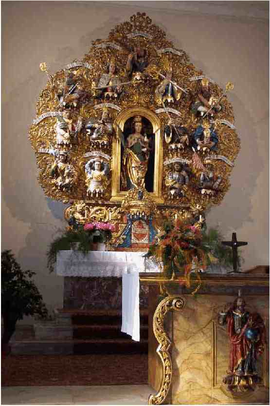 Der Vierzehn-Nothelfer-Altar in der Katholischen Kirche un Thumsenreuth Foto: Harald Stark, 2004